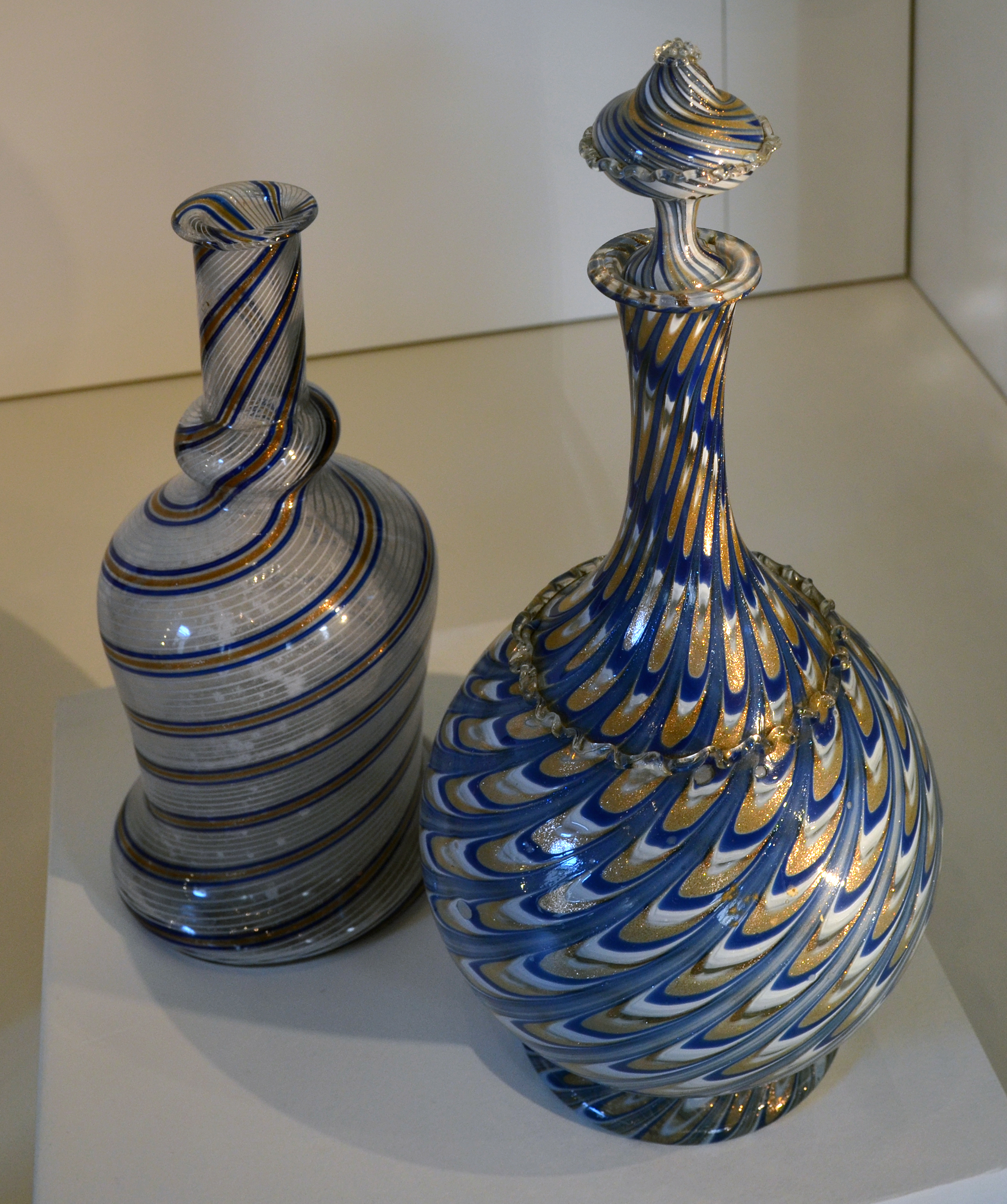 Carafes contenant des fils de verre aventuriné, 2ème moitié du 19ème siècle. Musée du verre à Murano.